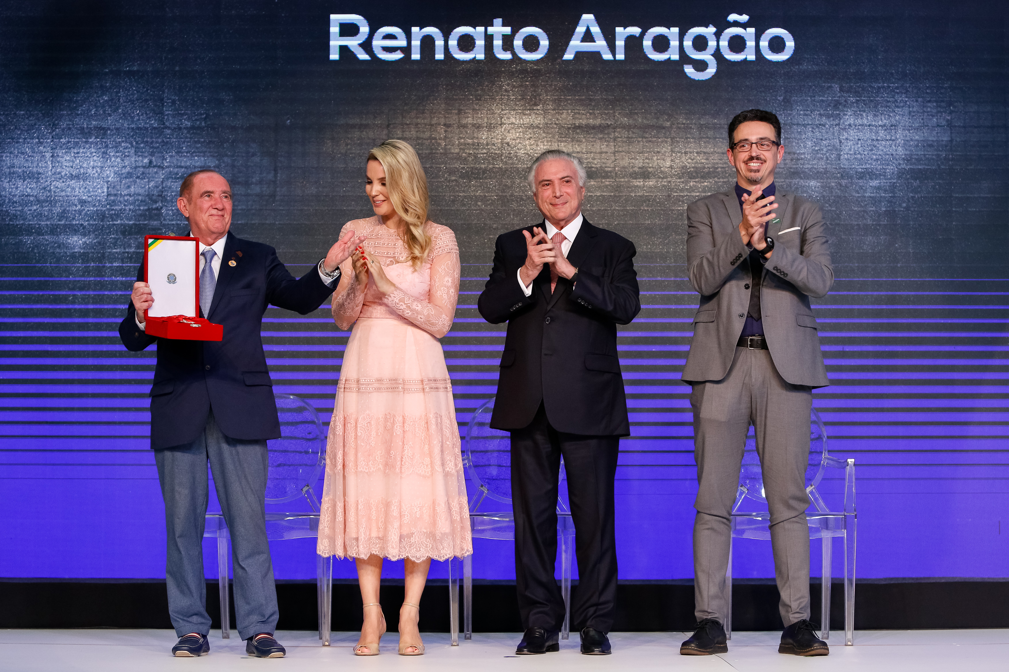 (Brasília - DF, 19/12/2017) Renato Aragão, recebe a Insígnia da Ordem do Mérito Cultural no Grau de Grâ-Cruz . Foto: Alan Santos/PR